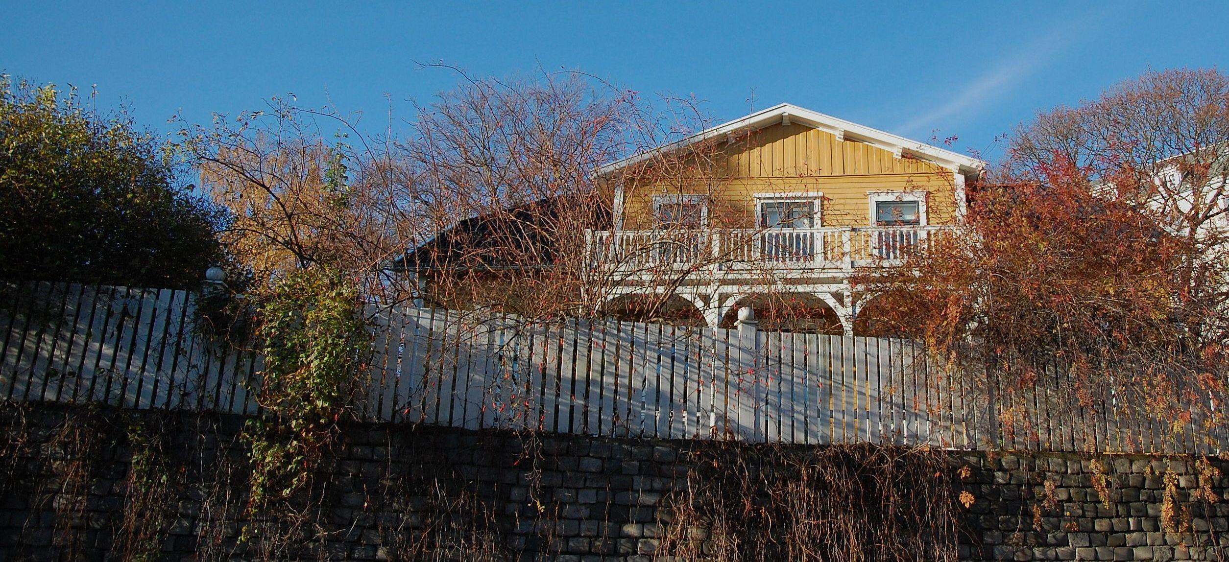 Løkkehuset Gimle på Frogner i Oslo. Adresse Gimle terrasse 1.